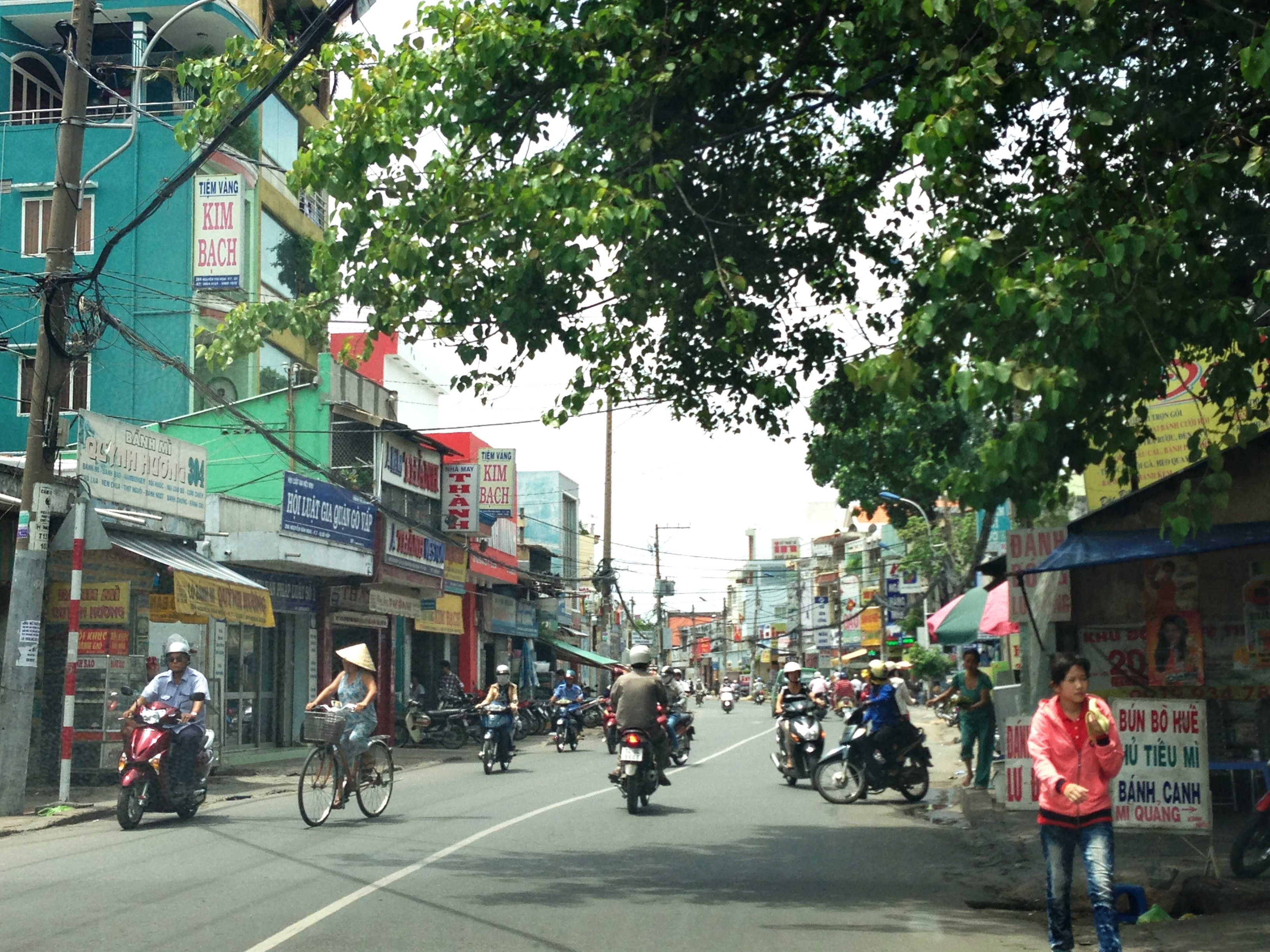 Nguyen van nghi , p7 go vap hcmvn